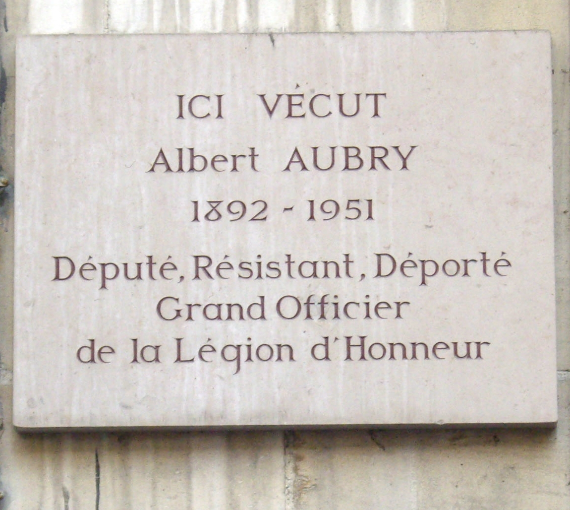 Plaque apposée au n° 37 de la rue Rousselet, Paris 7e, où habita le député et résistant Albert Aubry (1892-1951).